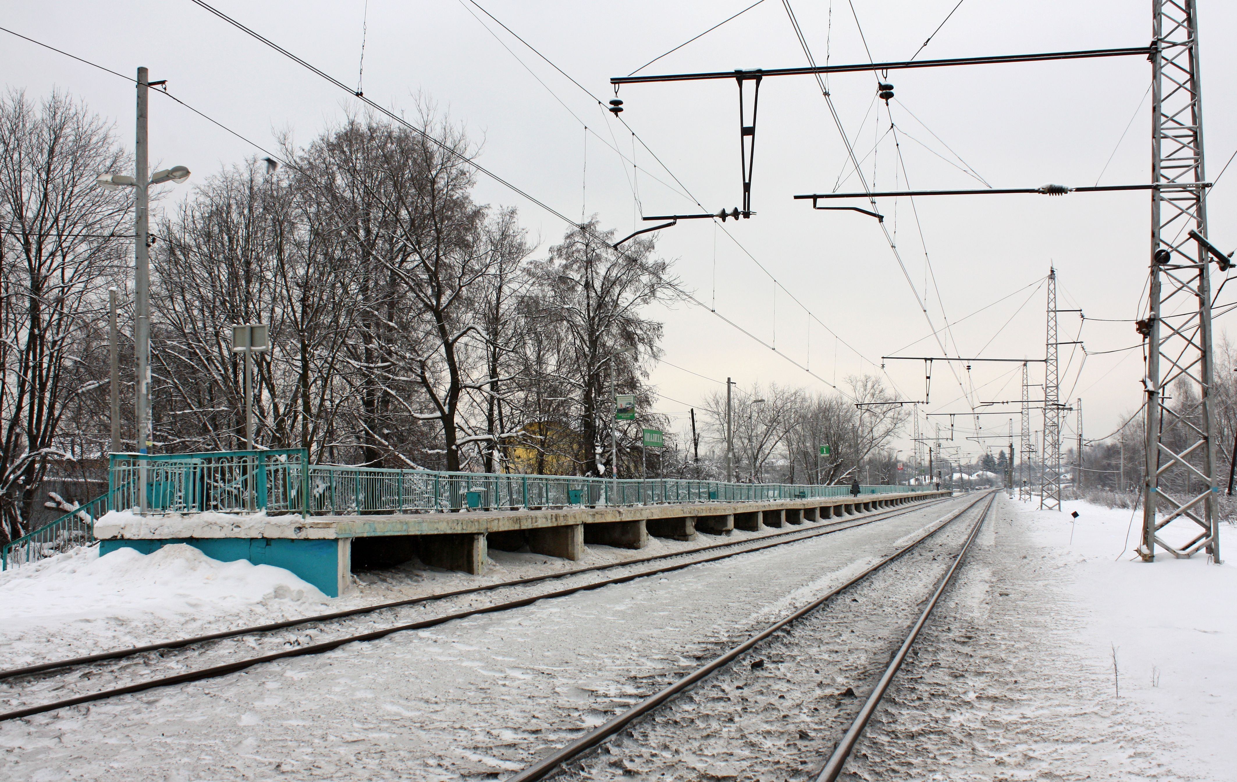 Станция Опалиха Рижского направления Московской железной дороги. Вид в сторону Москвы